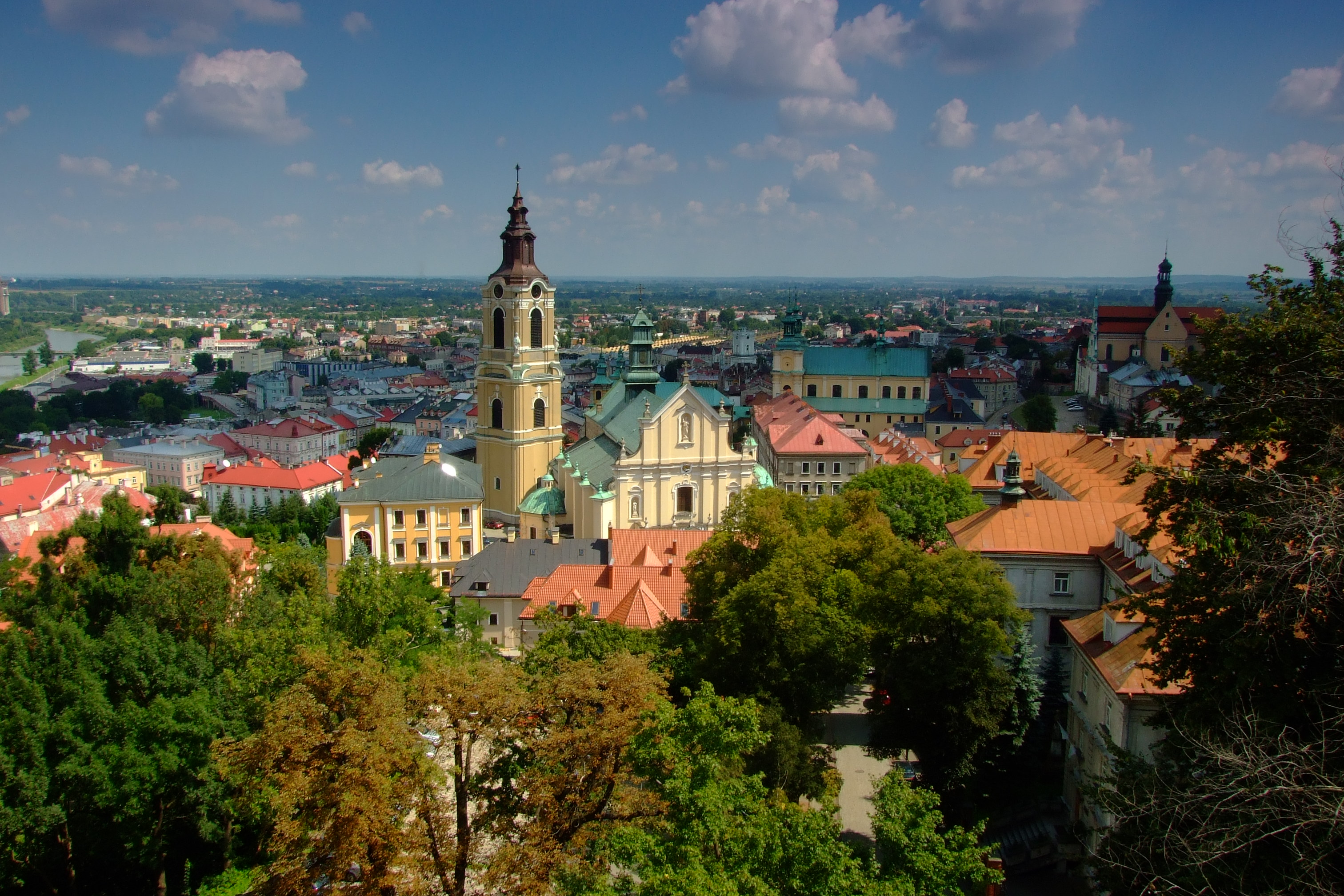 Przemyśl - Bazylika archikatedralna p.w. Wniebowzięcia NMP